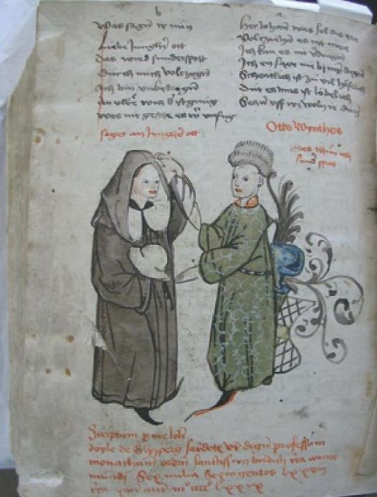 Johannes Doyle von Gleiburg, Schreiber und Maler der Handschrift Bad Berleburg, Schlossbibliothek RT 2/1, und der Empfänger Otto Winther (Otto Winter, Burgmann und Edelknecht zu Hallenberg, etwa 1425 - vor 1499, verheiratet mit Katharina von Biedenfeld-Hallenberg)